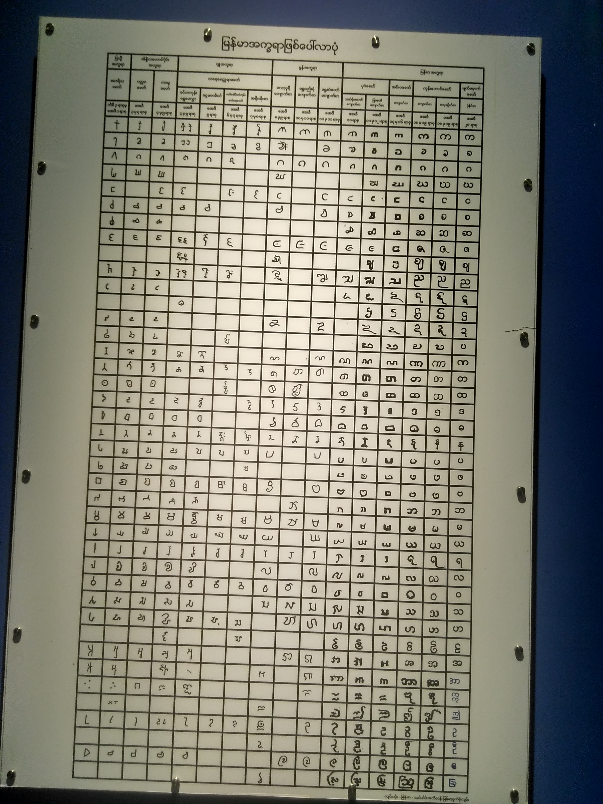 မြန်မာအက္ခရာ ဖြစ်ပေါ်လာပုံ